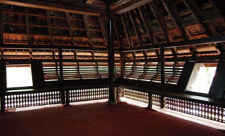 Krishnapuram Palace durbar